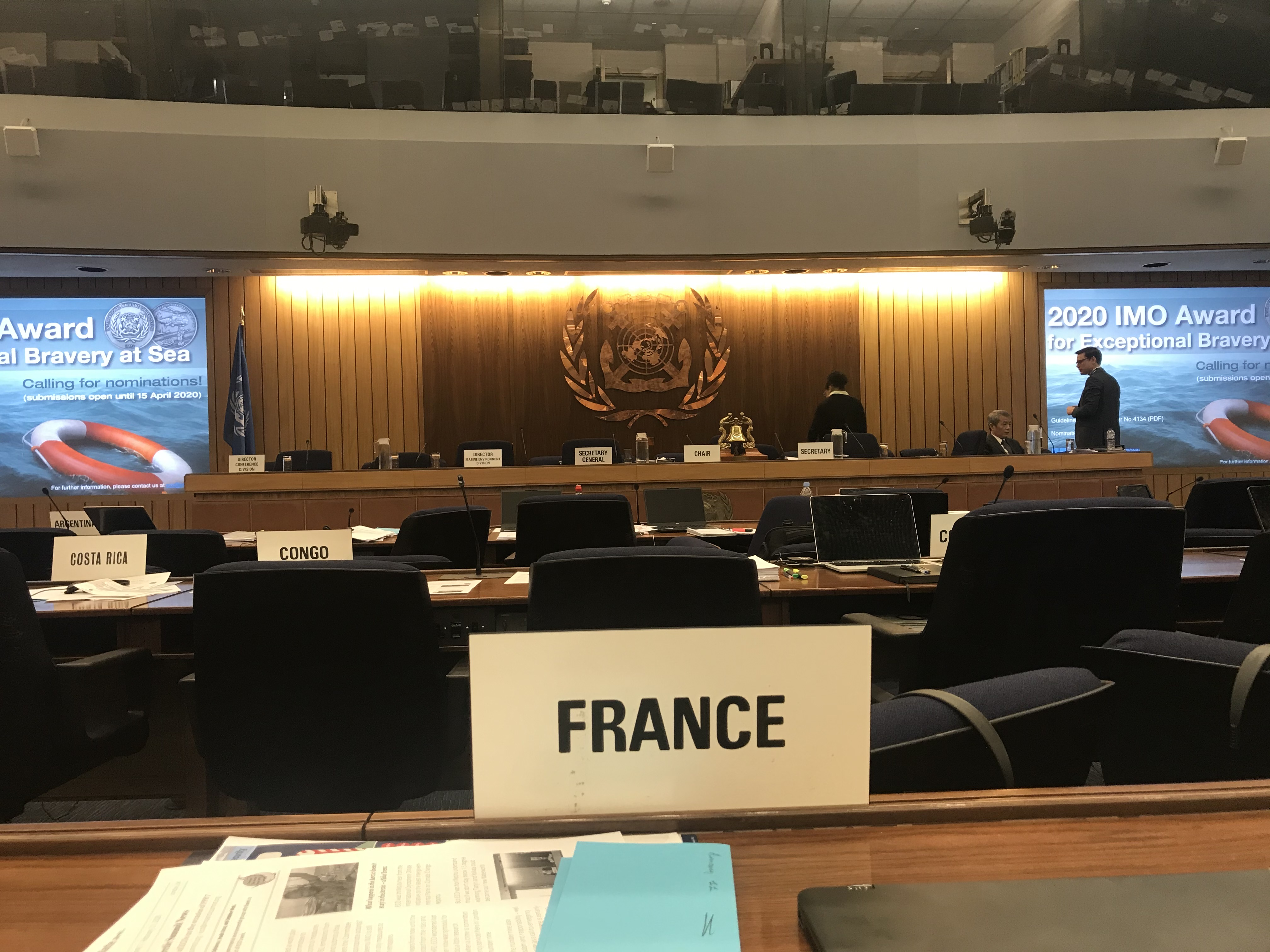 La France siège à l'Organisation Maritime Internationale chargée de modifier la Convention MARPOL et de désigner les zones de contrôle des émissions sur proposition des Etats membres.